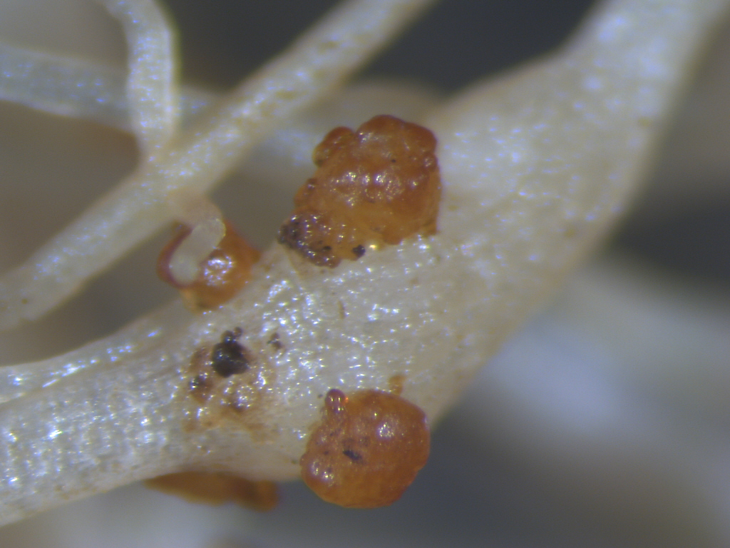 Meloidogyne incognita on Solanum lycopersicum (egg mass)